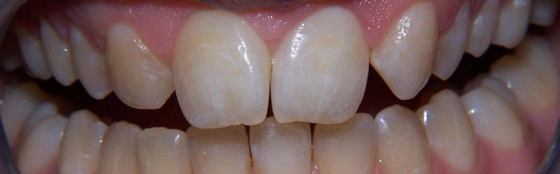 ֆլյութրոզով ախտահարված ատամներ